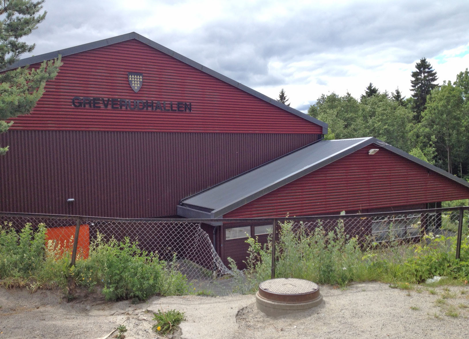 Greverudhallen, Oppegård